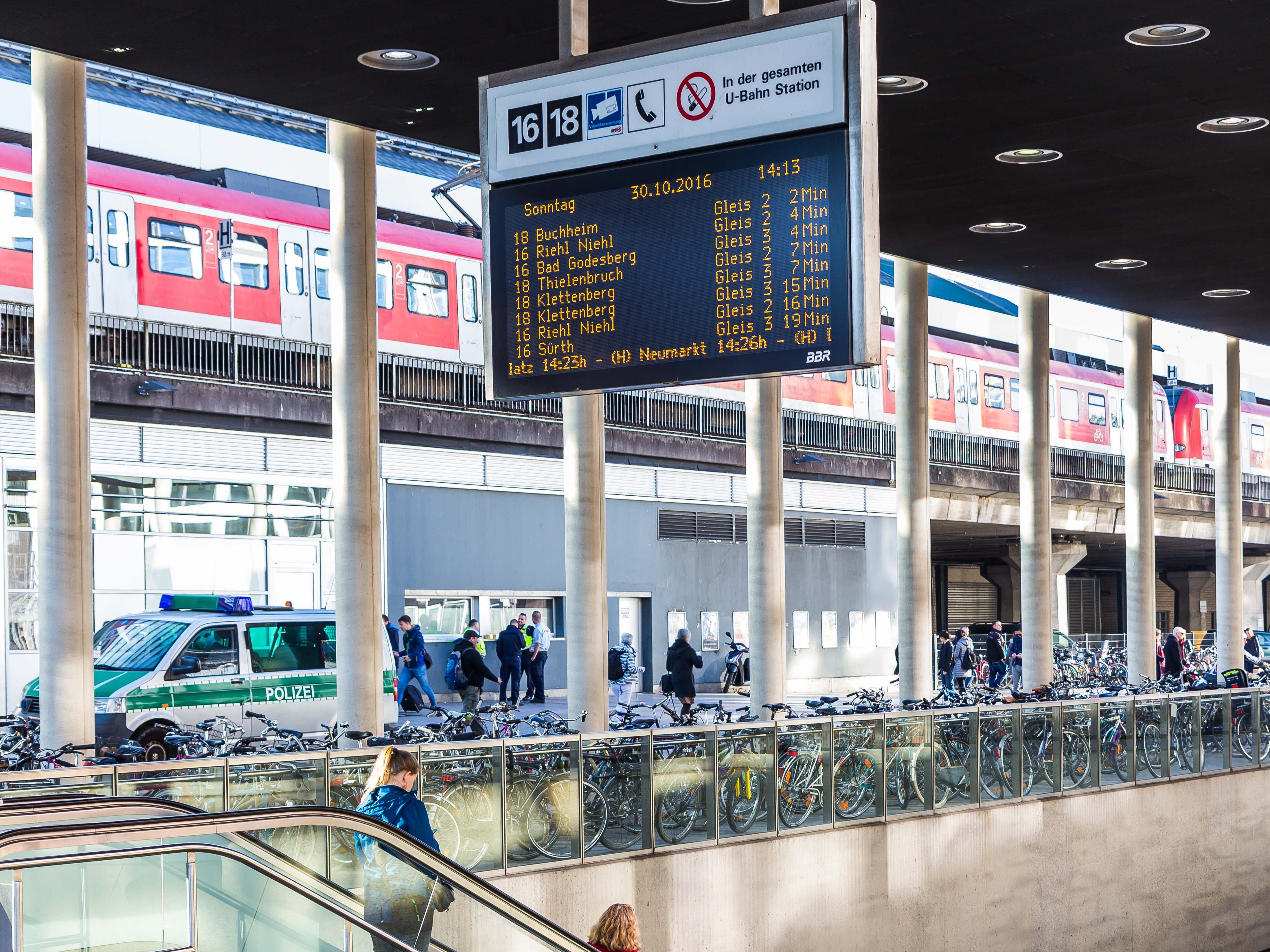 Großflächenanzeiger Breslauer Platz, Stadtbahn Köln